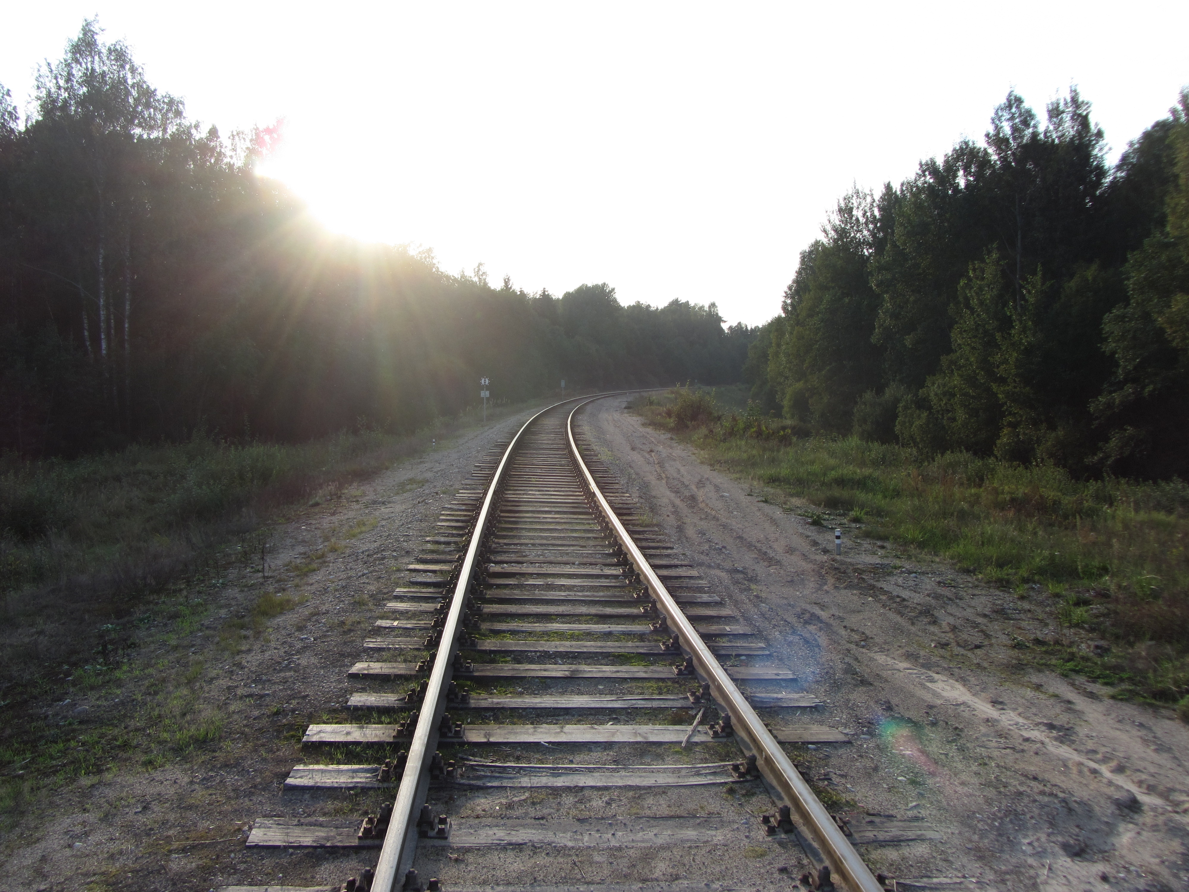 Kuktiškių sen., Lithuania